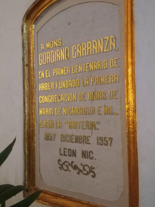 Placa que conmemora el centenario de la fundación de las Hijas de María por Mons. Gordiano Carranza. Se le atribuyé erróneamente el haber iniciado la Gritería, un error común. Mons. Gordiano Carranza no inició la gritería, más bien preservó una tradición ya antigua.